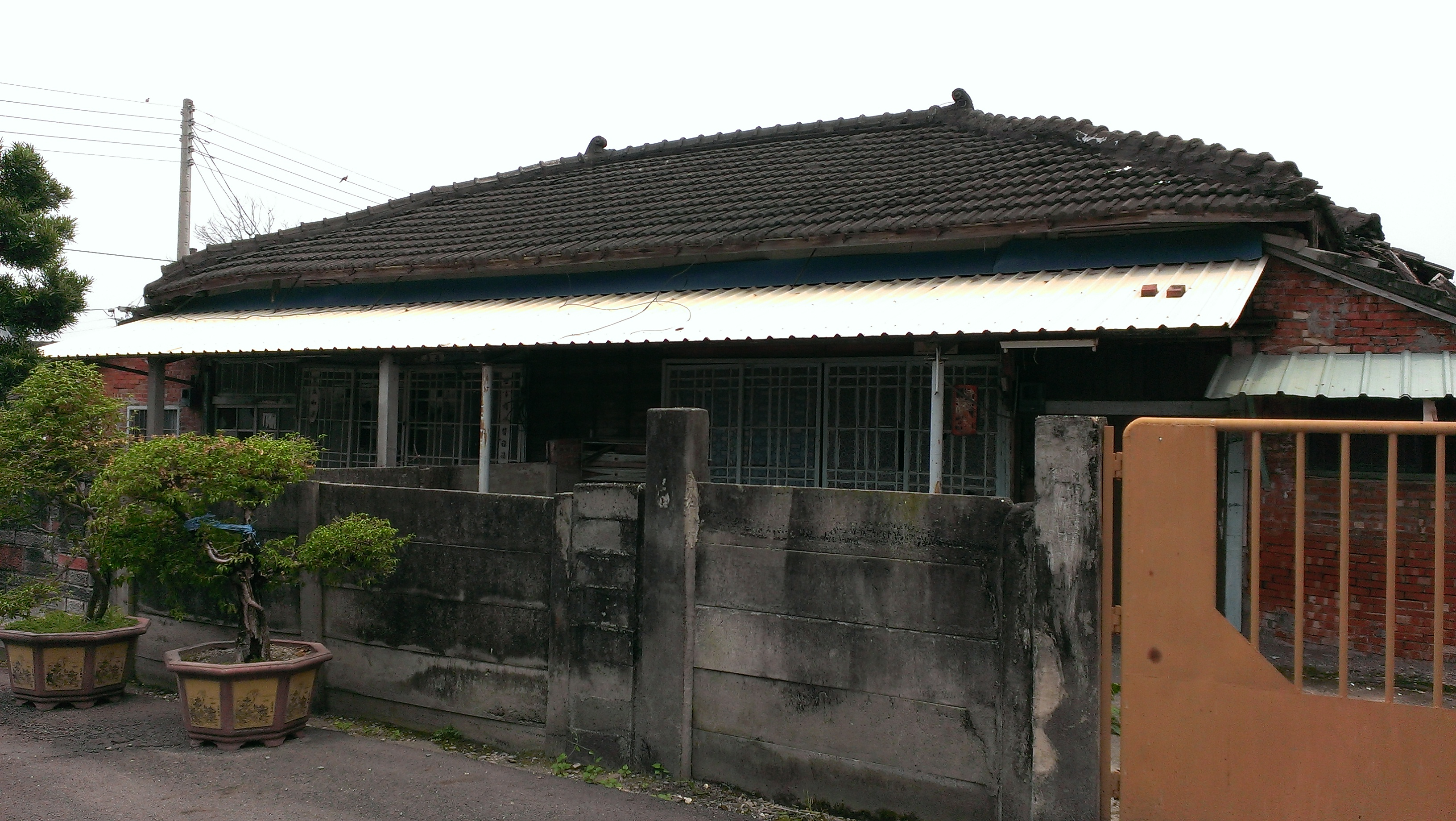 雲林縣歷史建築──莿桐饒平國小舊宿舍